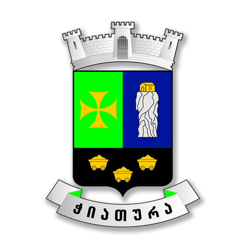 ჭიათურის მუნიციპალიტეტის გერბი